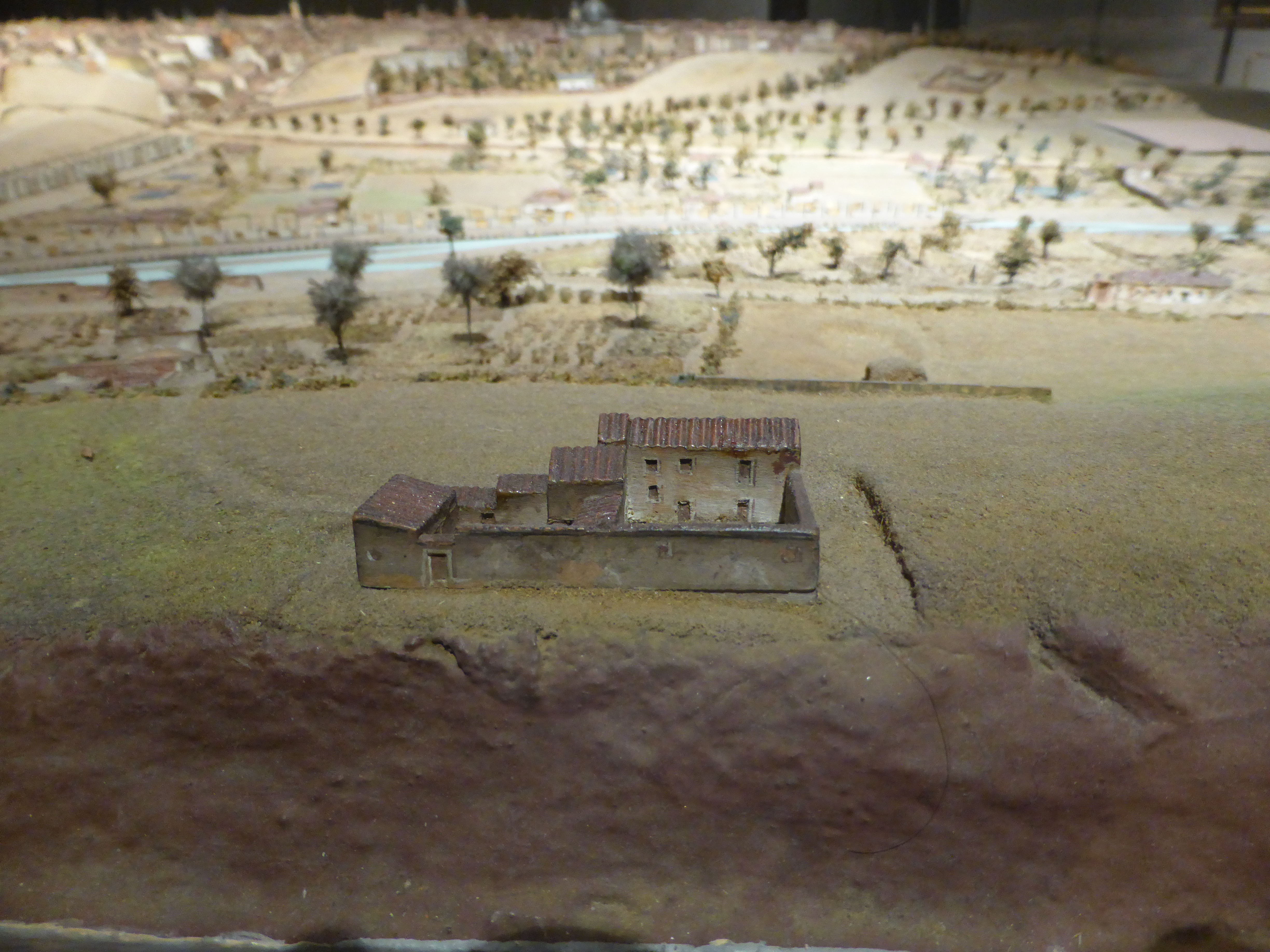 En el Museo de Historia de Madrid (conocido tradicionalmente como Museo Municipal) se encuentra la gran maqueta elaborada por León Gil de Palacio, entre los años 1828 y 1830. En el borde oeste de la maqueta se ha identificado la casa donde Francisco de Goya creó sus Pinturas Negras. La casa estaba dentro de la gran finca conocida como Quinta de Goya o Quinta del Sordo. Al fondo se ve el río Manzanares (en maqueta). Nota: información publicada en la revista española "Descubrir el Arte", en su número 201, de noviembre de 2015, donde se identifica la casa.